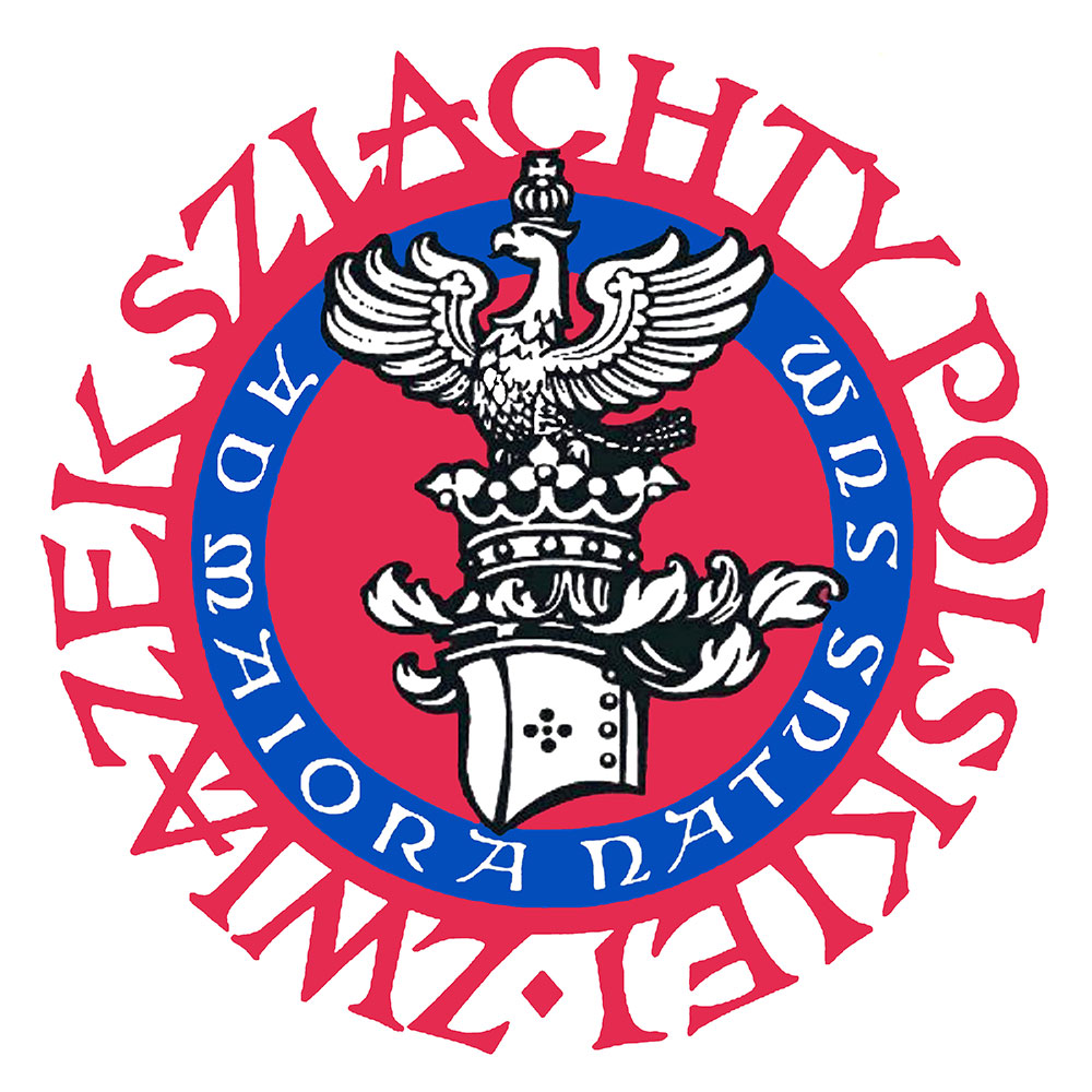 Logo Związku Szlachty Polskiej - 20 rocznica powstania